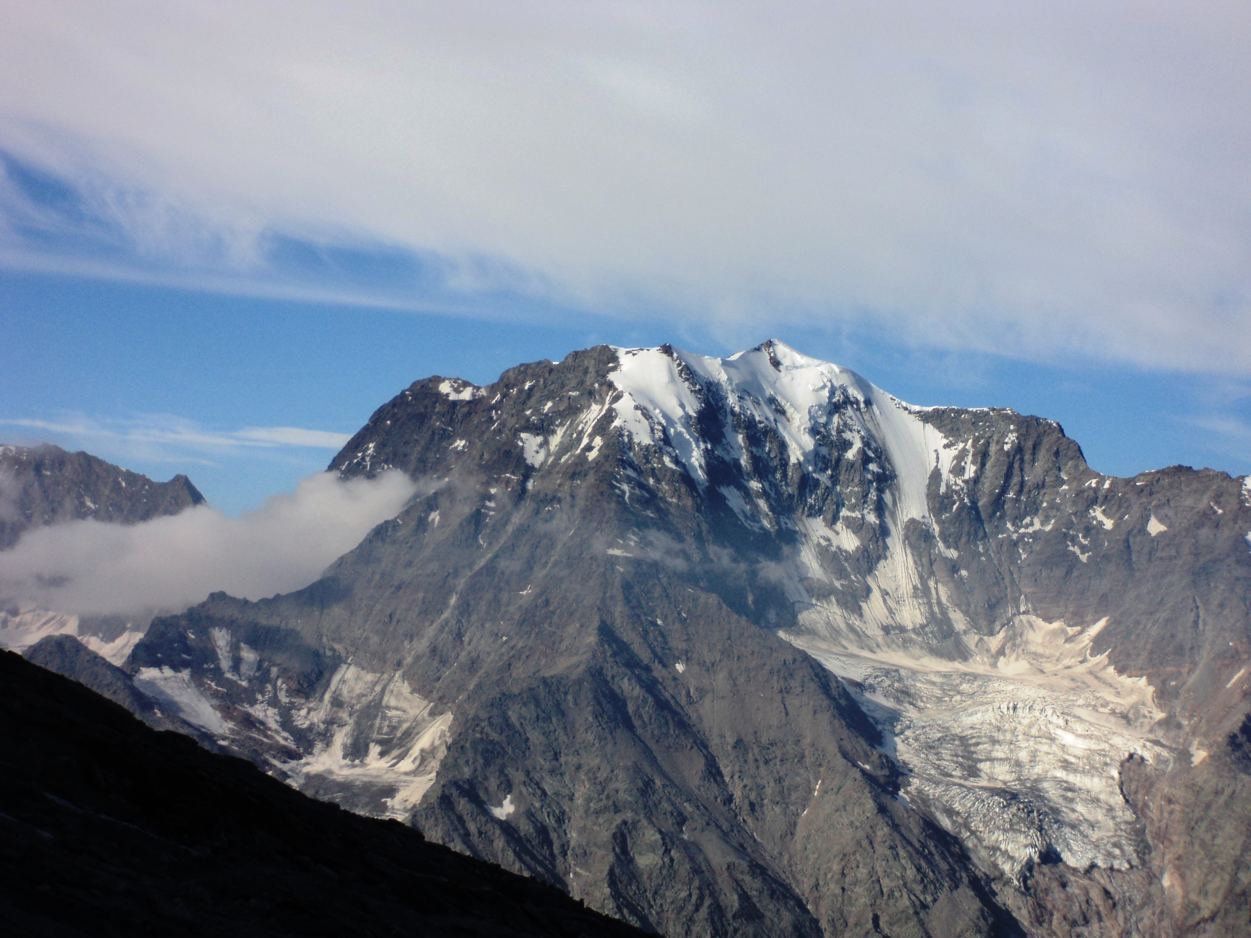 Il Fletschhorn visto da nord-est sopra il passo del Sempione e salendo al monte Leone